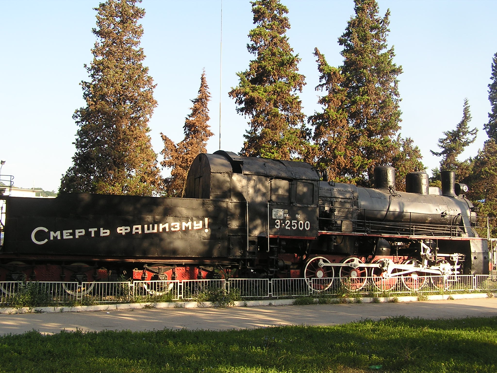 Севастополь. Паровоз-памятник Эл-2500 бронепоезда «Железняков»